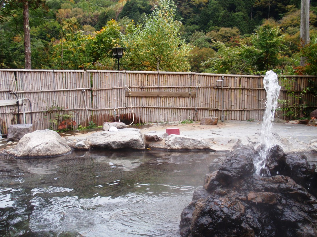 長野県大町市葛温泉、高瀬館混浴露天風呂